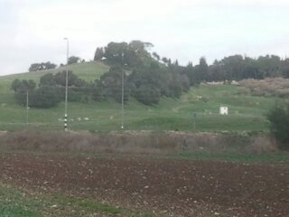 תל בעמק יזרעאל. שִׁמֶרוֹן הייתה אחת הערים החשובות בצפון ארץ ישראל בעת העתיקה. היא נזכרת בתנ"ך בשם זה, ובתעודות מחוץ למקרא בשם שמע'ון.